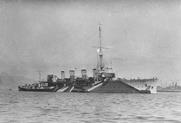 HMS ADVENTURE in dazzle camouflage.